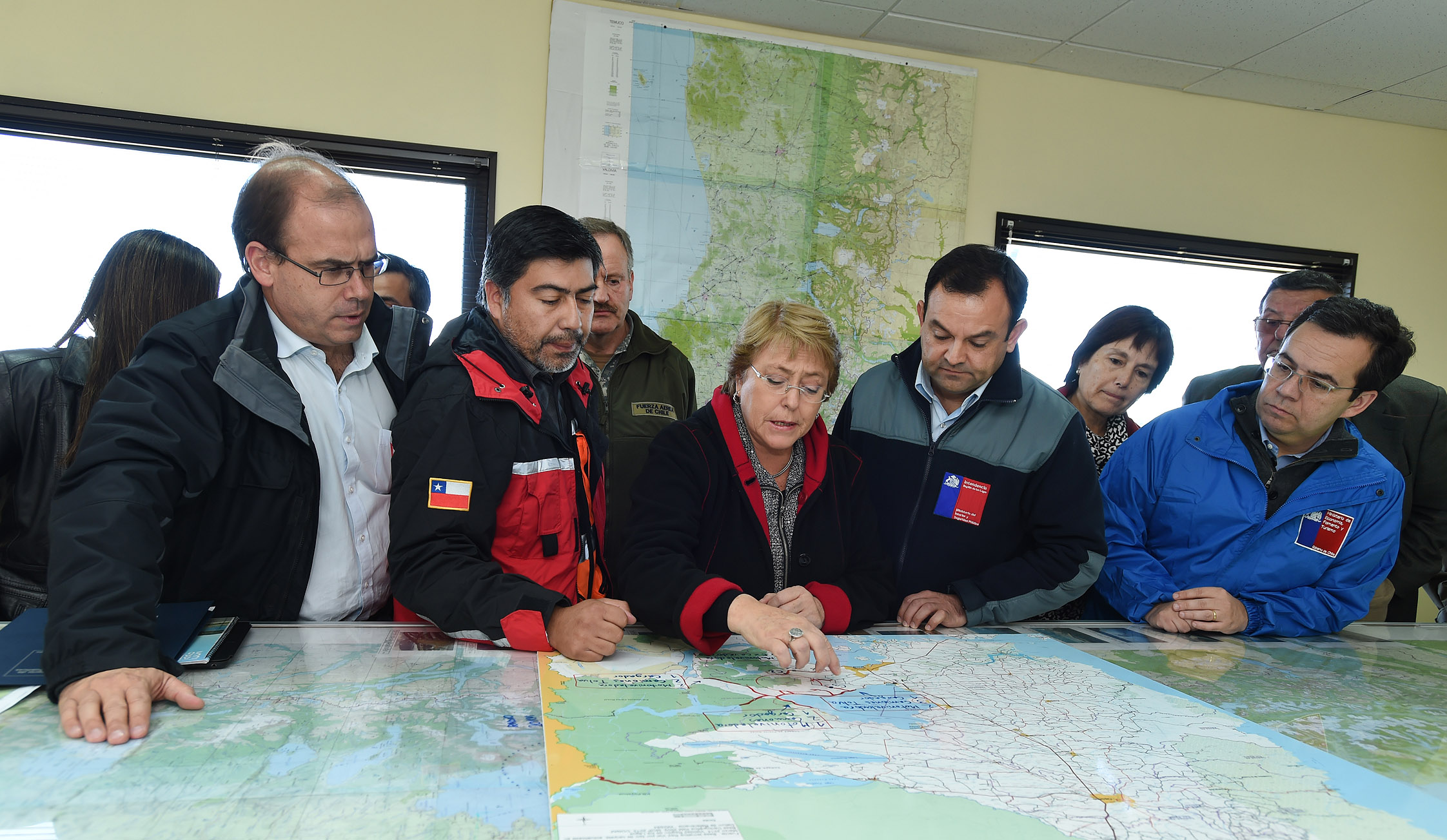 Gobierno de Chile